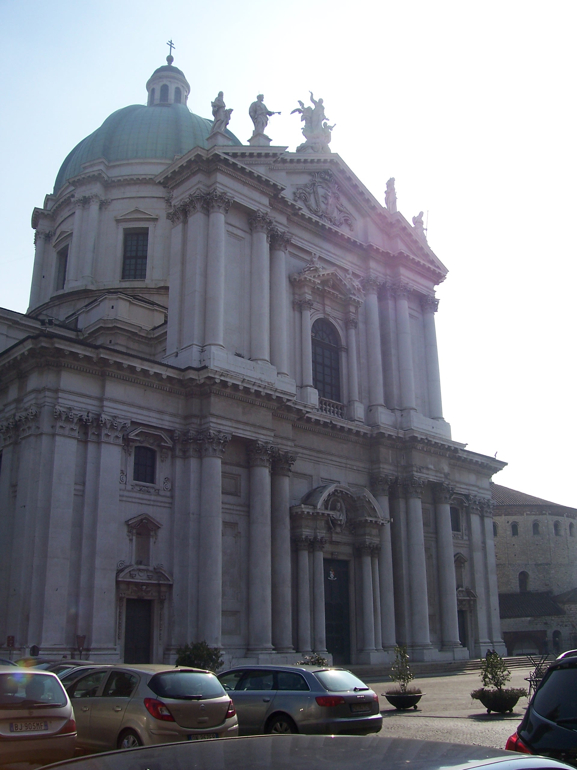 duomo nuovo brescia facciata.jpg